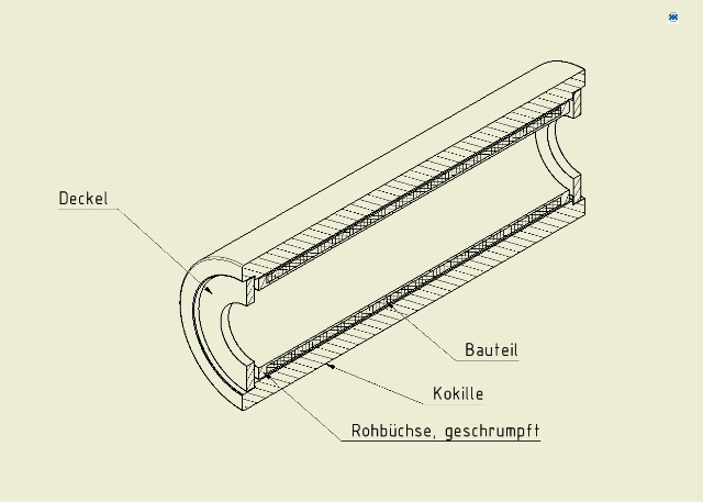 Schleuderguss Kokille Horizontal